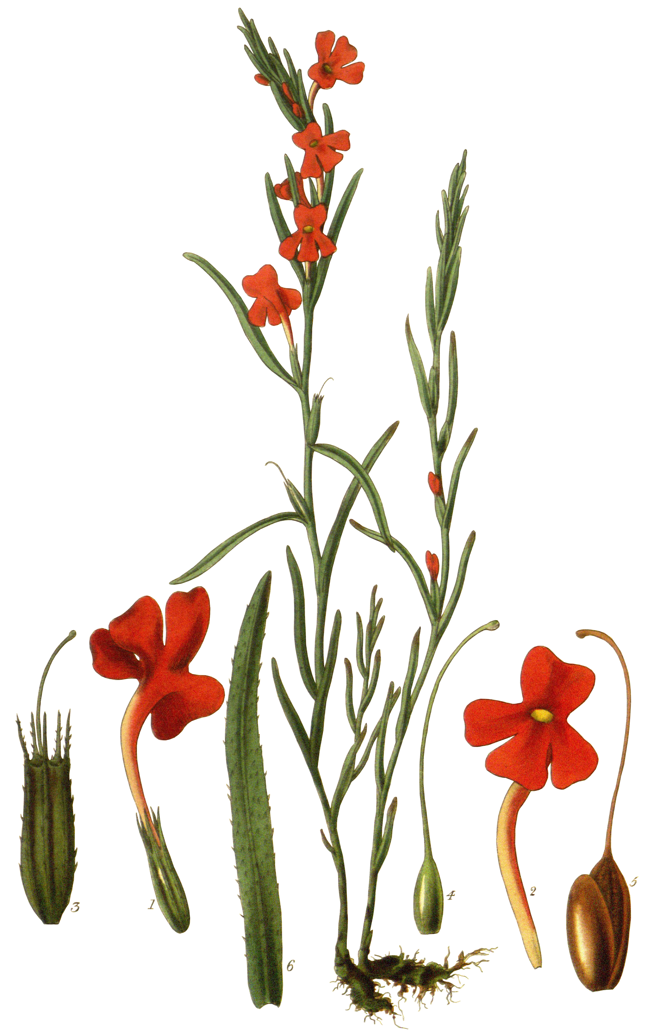 Campuleia coccinea Hook. = Striga asiatica (L.) Kuntze